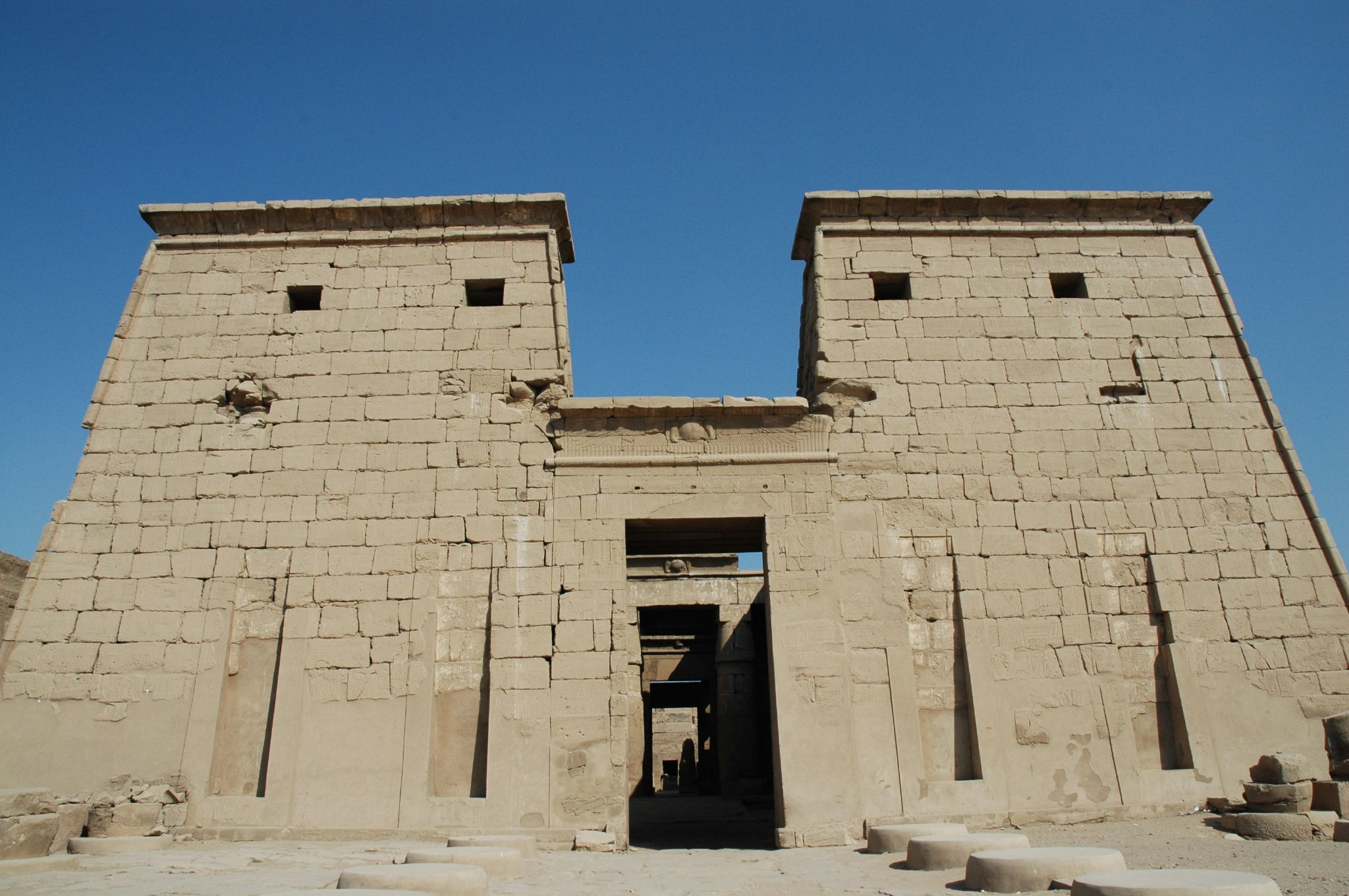 Tempio di Karnak: ingresso